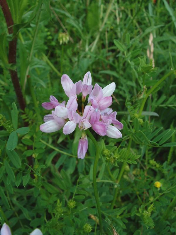 Coronille bigarrée, Bucey-lès-Gy